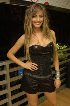 kata